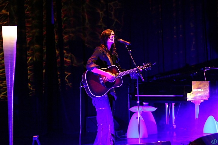 Cristina Donà nel tour teatrale "Il Suono della Luce" all'auditorium di Bergamo, il 1 aprile 2006